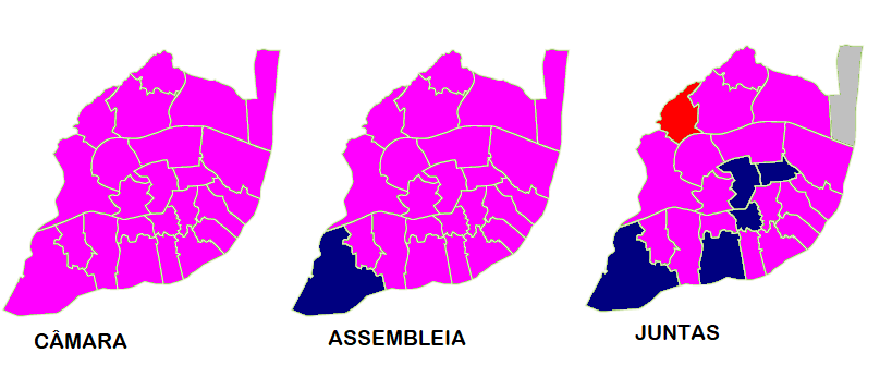 Mapa demonstrativo do partido mais votado por freguesia